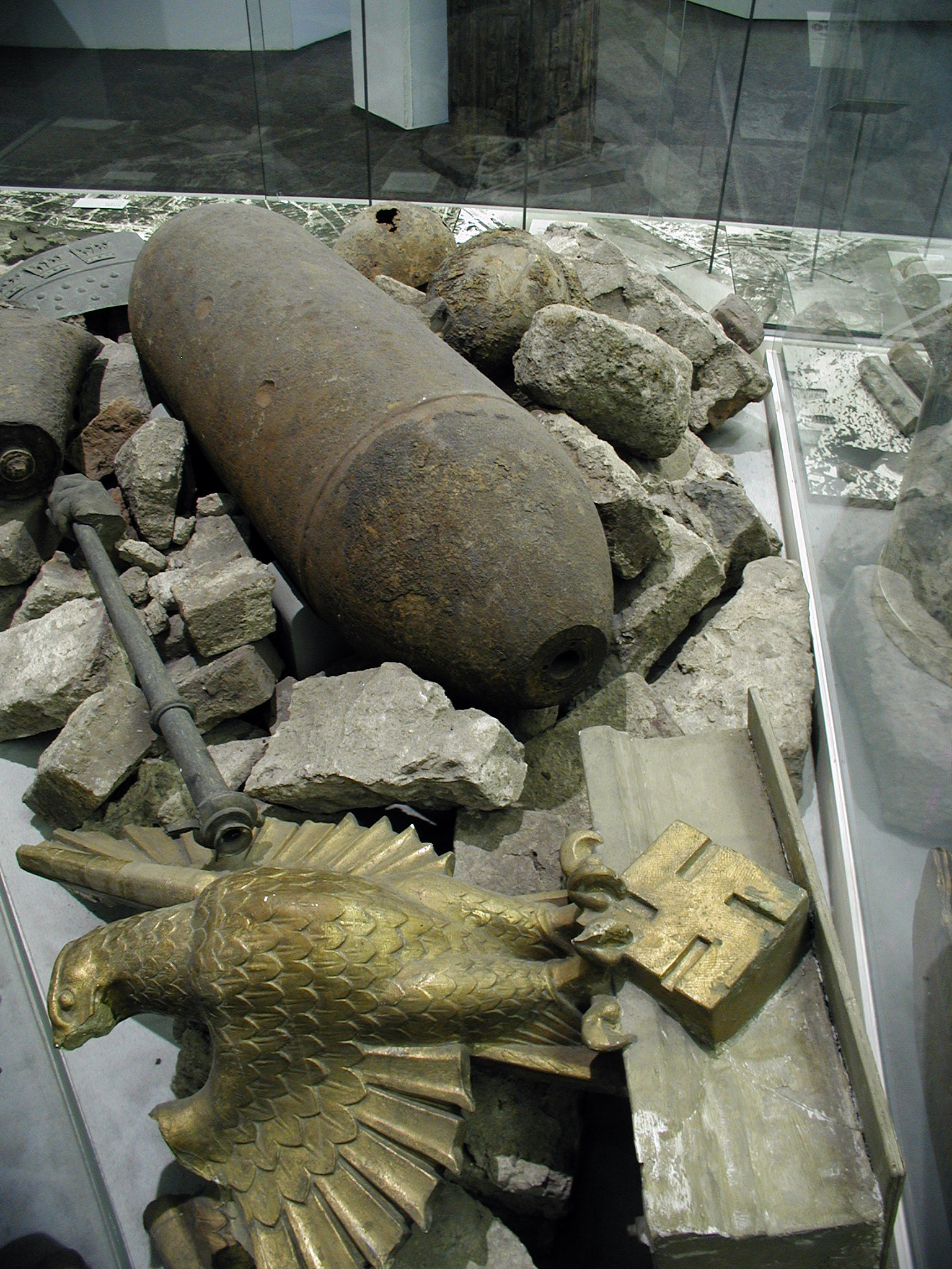 Köln, Andenken an den 2. Weltkrieg